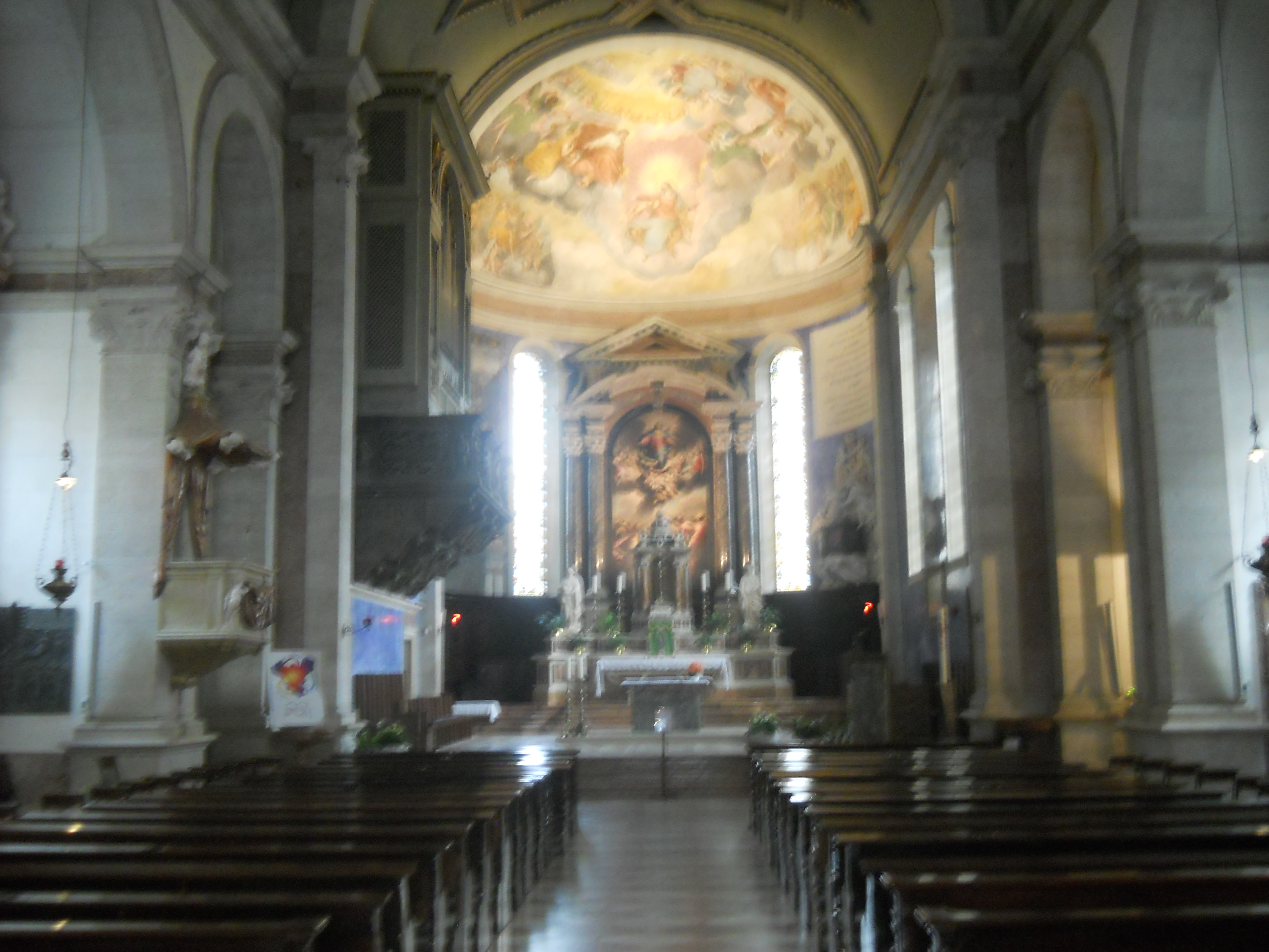 Interno della chiesa di Santa Maria Maggiore a Trento